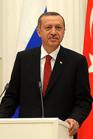 Премьер-министр Турции Реджеп Тайип Эрдоган